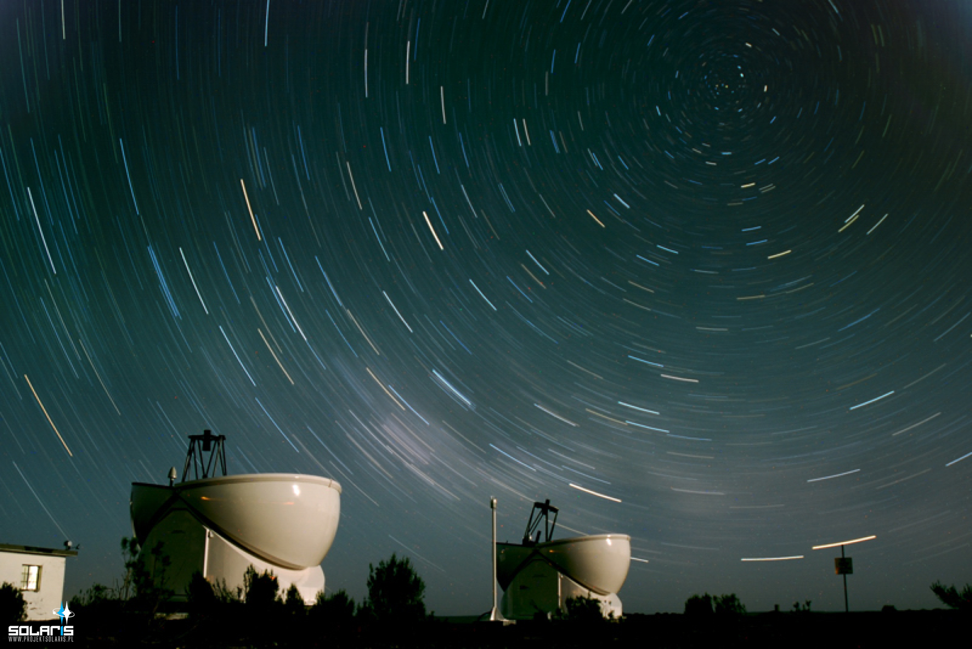 Dwa z czterech teleskopów Projektu Solaris wchodzące w skład globalnej sieci.